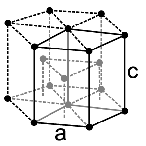 Hexagonale dichteste Kugelpackung, schematisch gezeichnet